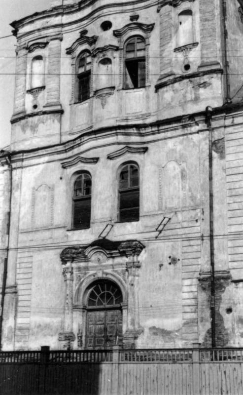 Erlöser Verklärungs-Kirche, Panzerstraße 15 Minsk, März 1943 Film 69/31 Foto: Dr. Nerling